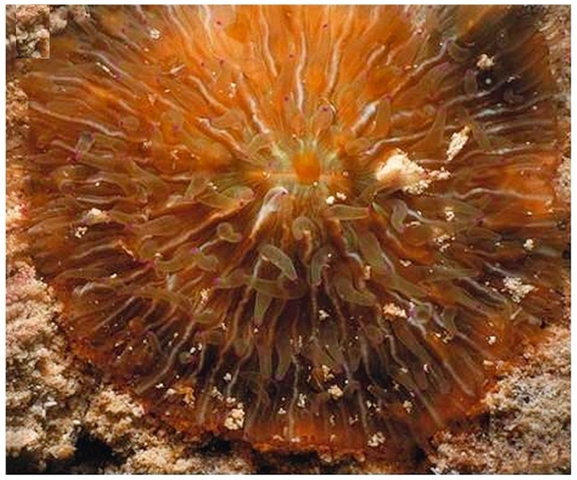 Heliofungia fralinae con largos tentáculos, Indonesia